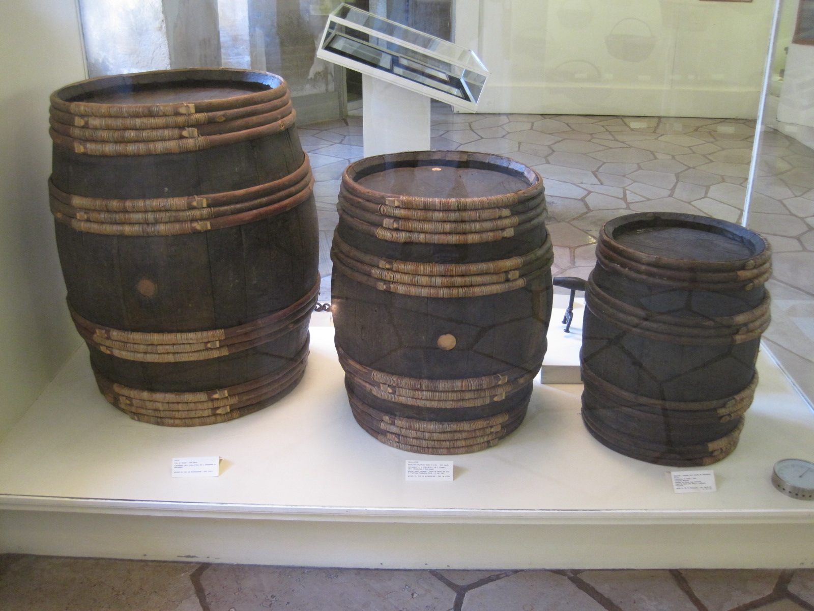 Hôtel des ducs de Bourgogne (Beaune) Pièce de 228L, Feuillette de 114L et Quartaut de 57L